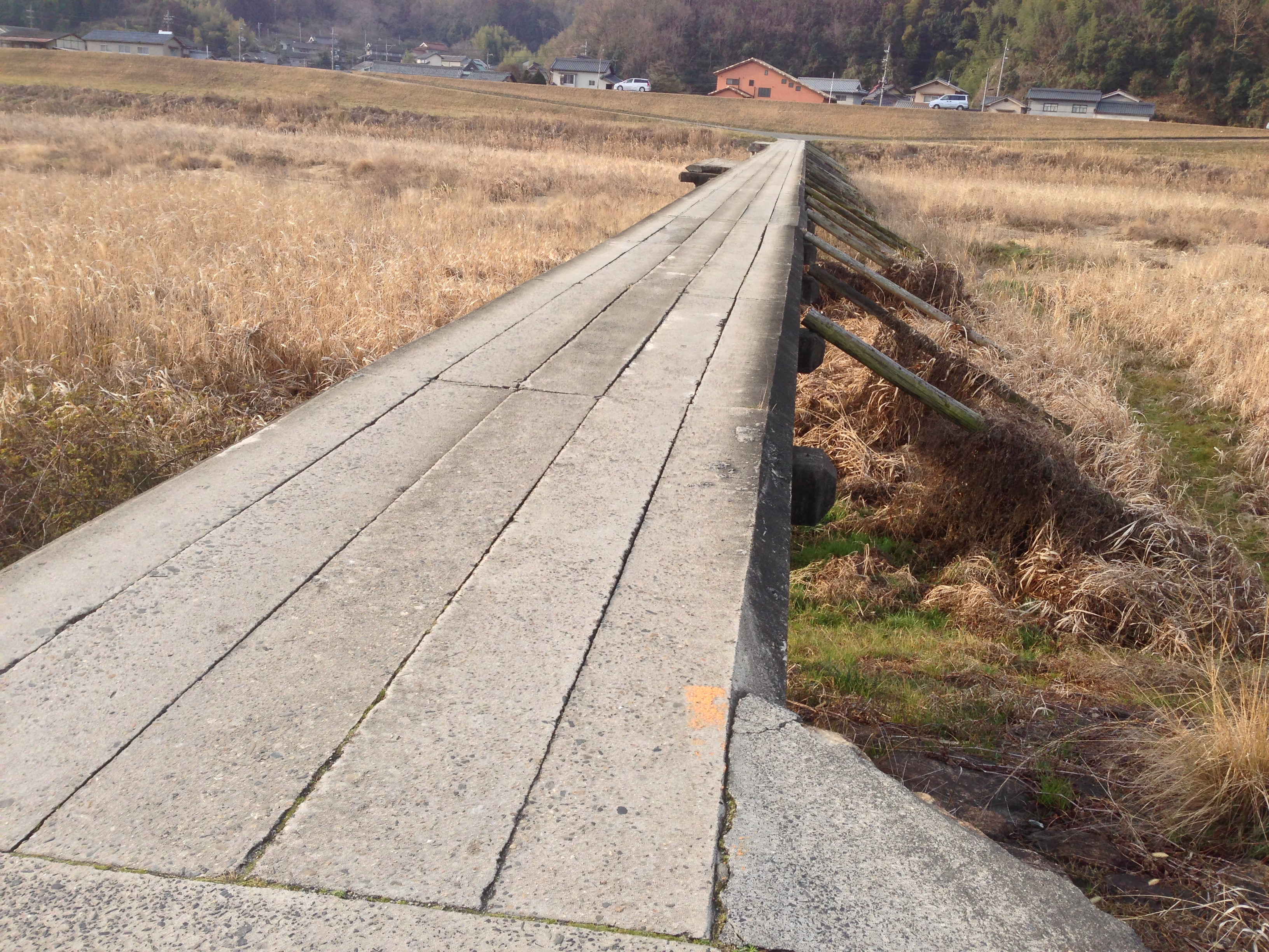 広島県府中市中須町に存在する、大型コンクリートパネルを使用した沈下橋。扇橋の下流側に位置する。芦田川中流域には橋の建設が遅れており、このような沈下橋が数多く見られたが、近年は徐々に減少している。